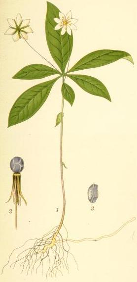 Skogsstjärna (Trientalis europaea) exemplar från skogsmark, fröna på fröfästet (fröhusets yttervägg bortfallen) och blomfodrets nedvikna blad (4/1), frö (6/1).